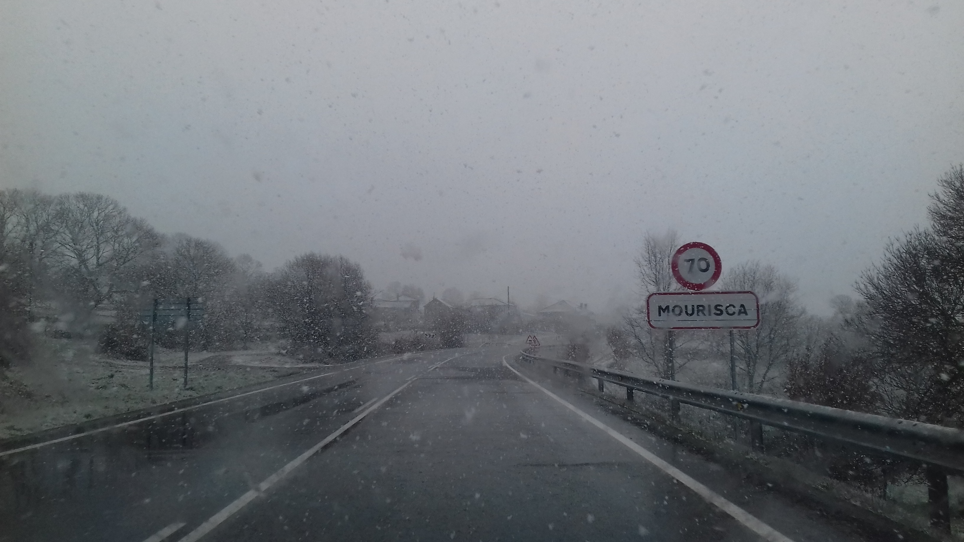 Entrada a Mourisca pola estrada OU-533